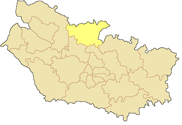 Canton de Doullens dans le département de la Somme